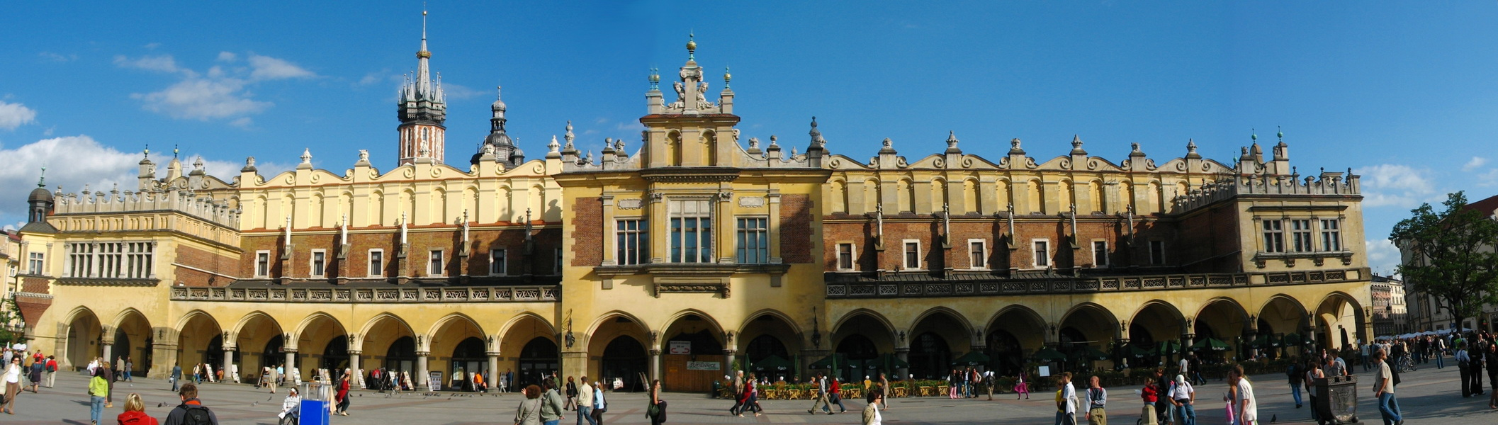 зроблено в польщі